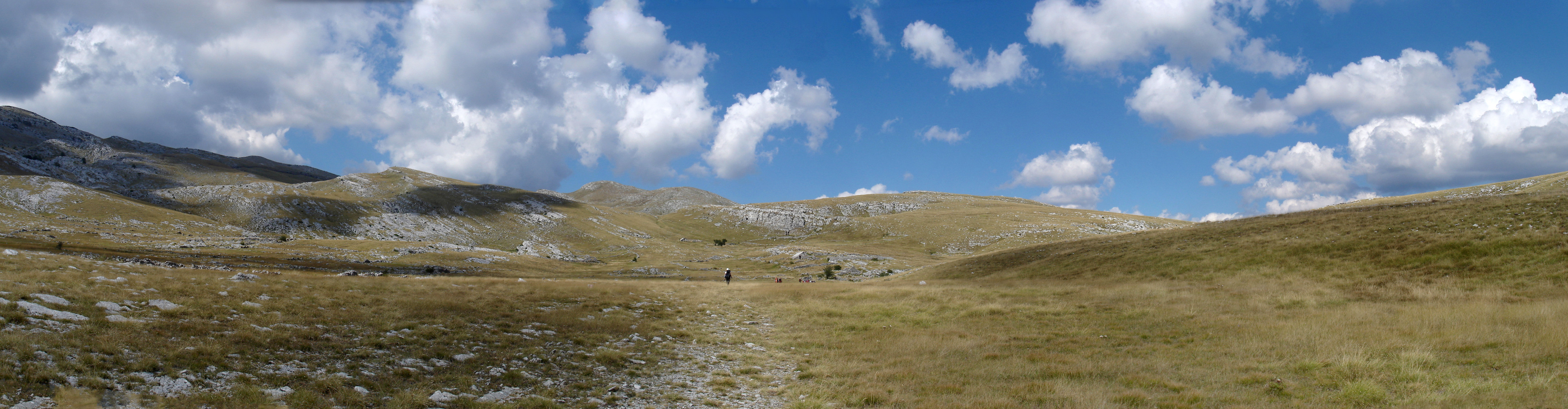 Plains near the village of Glavaš at the beginning of the climb to mountain Dinara (Croatia)